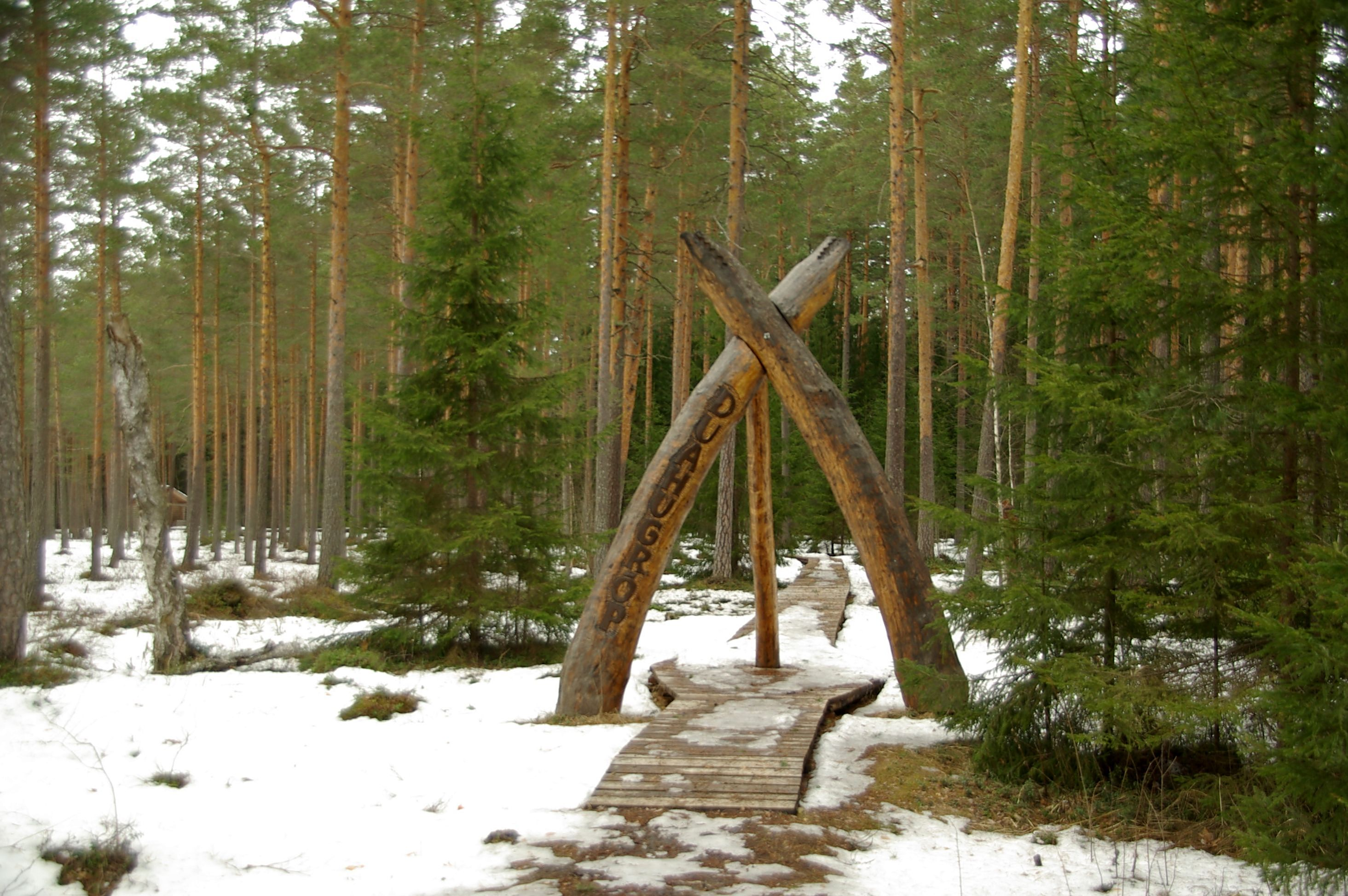 Ilumetsa meteoriidikraatrid on meteoriidikraatrid Põlva maakonnas Veriora vallas.